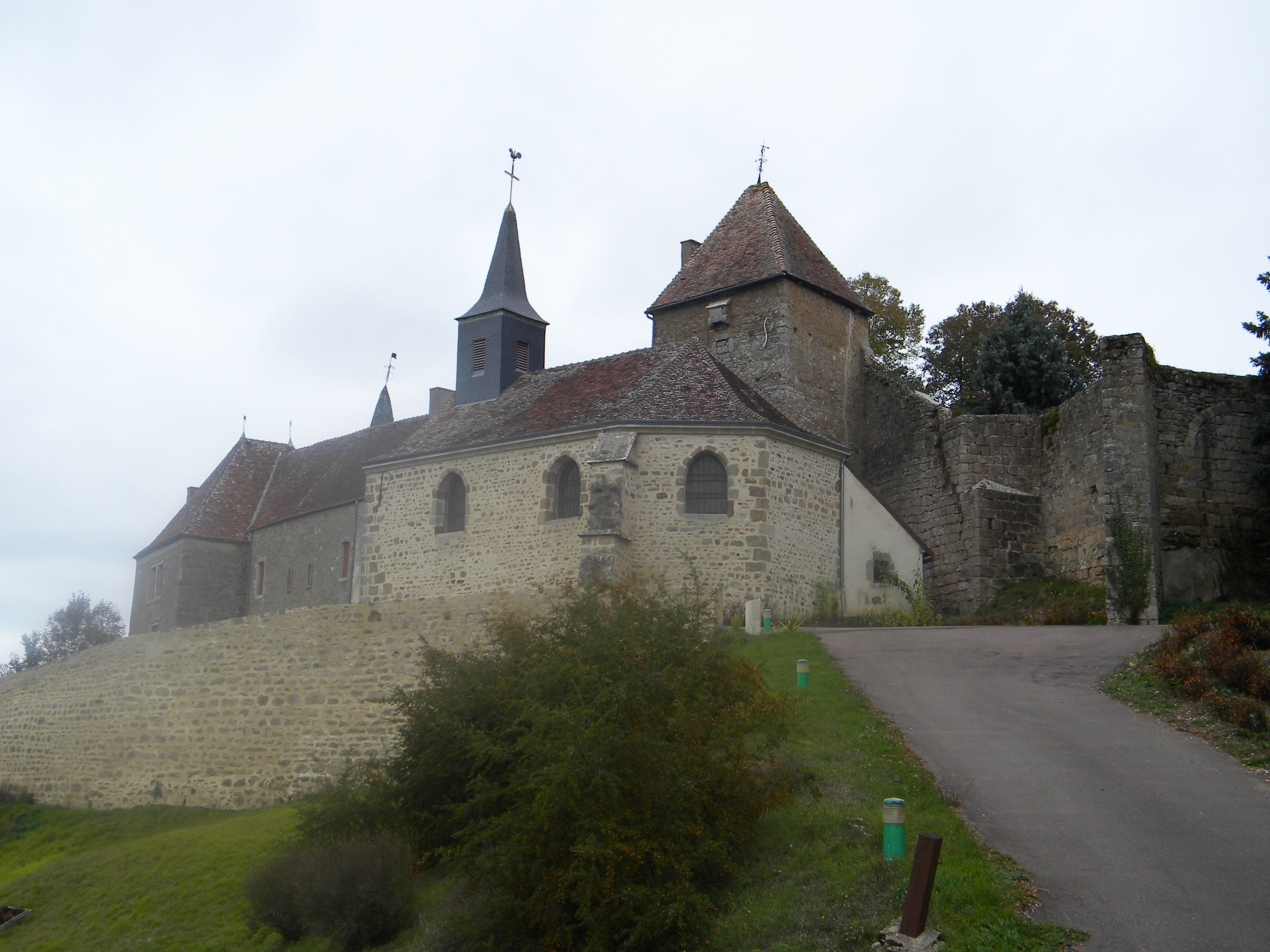 pregejxo de Jours-en-Vaux